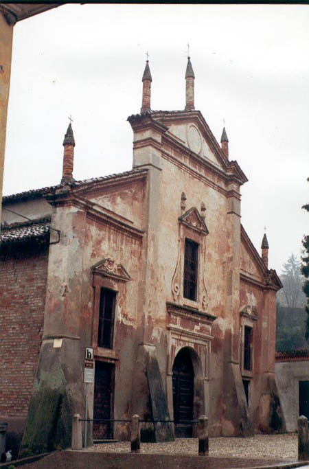 Chiesa di San Giovanni a San Colombano al Lambro